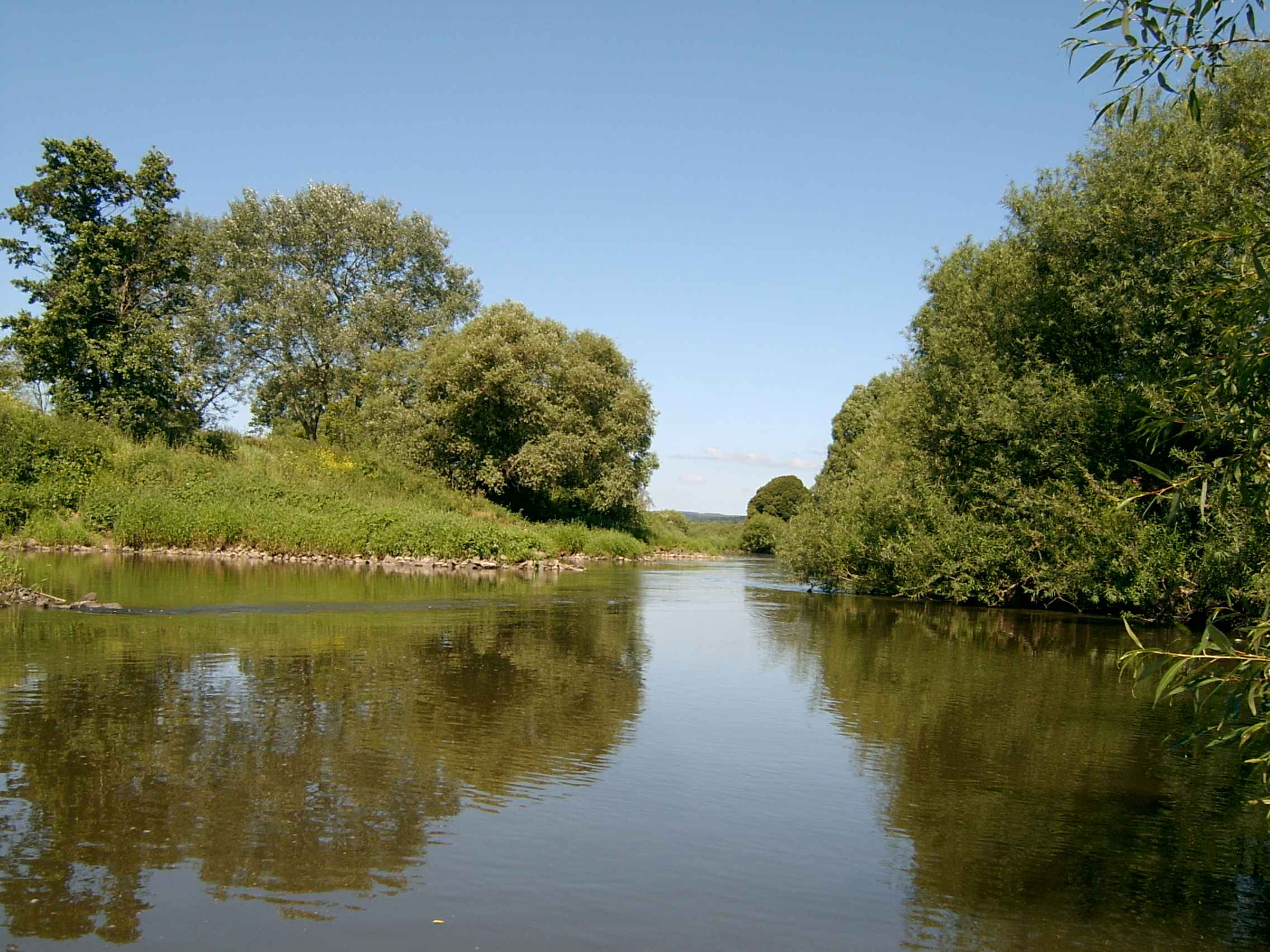 Die Lahn zwischen Gießen und Wetzlar.